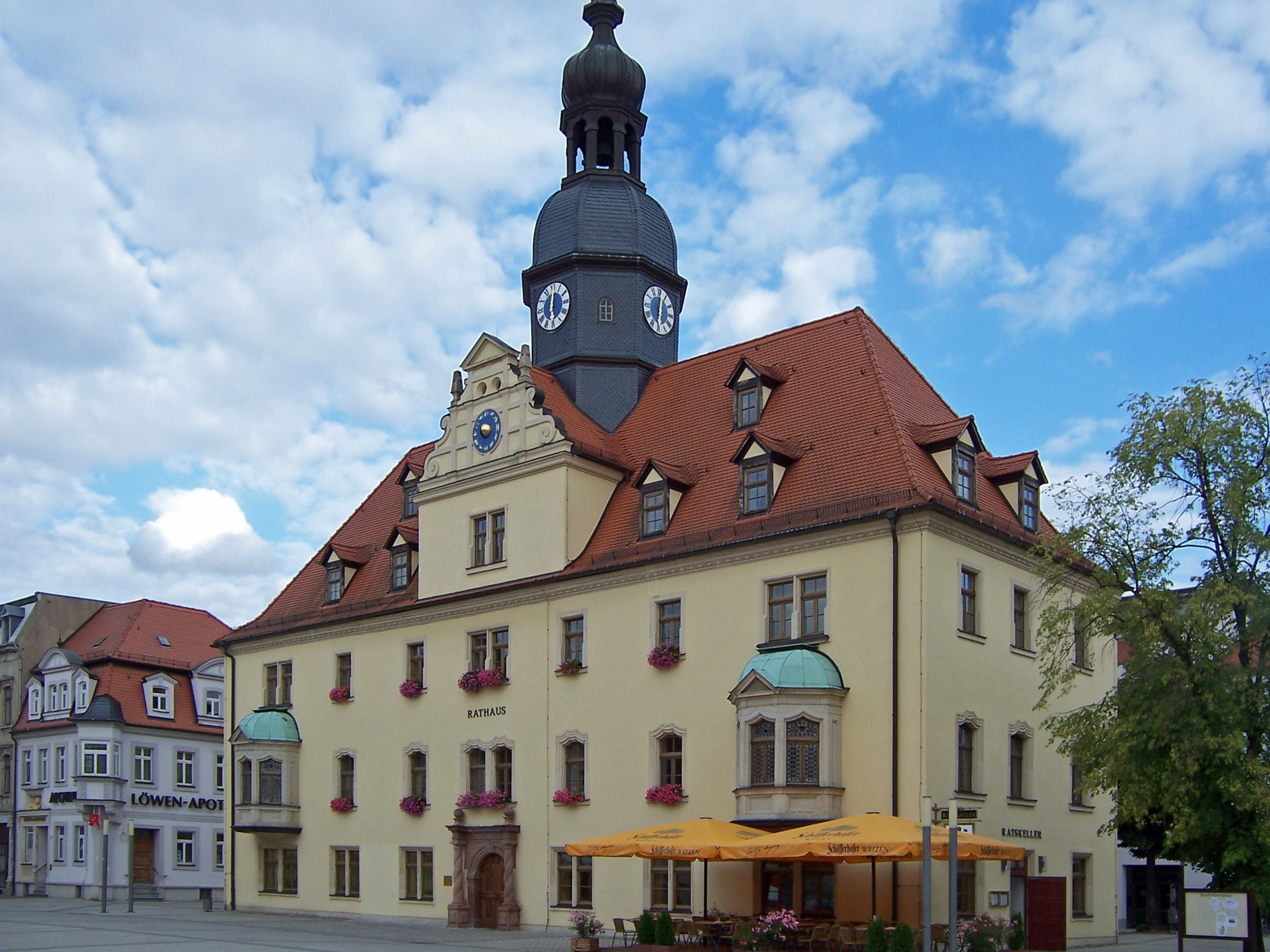 Rathaus Borna am Markt